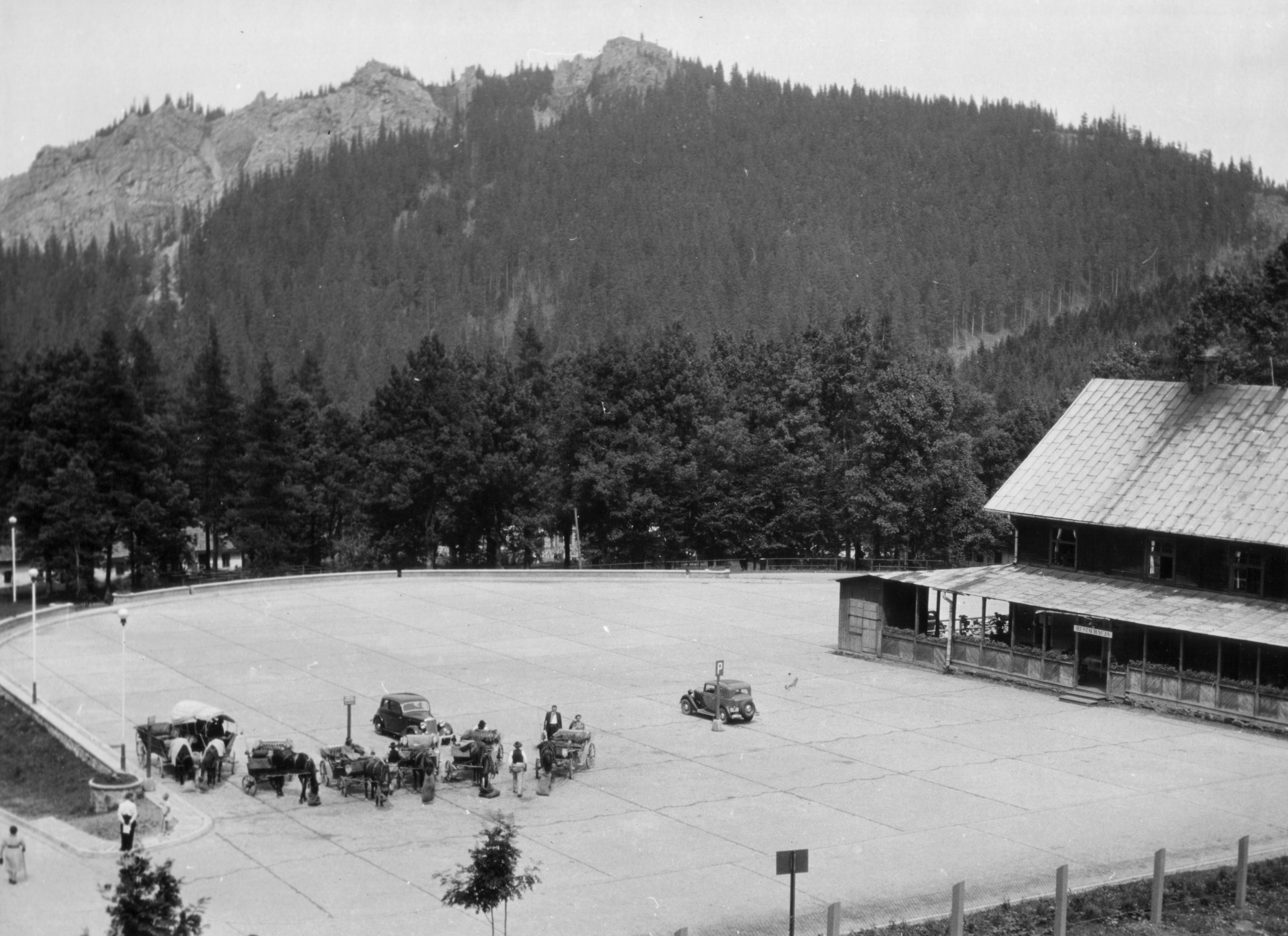 A Kasprowy csúcshoz tartó drótkötélpálya alsó végállomása előtti parkoló. - Lengyelország, Kis-Lengyelországi vajdaság, Liptói-havasok, Tátra, Északnyugati-Kárpátok Location: Poland, Tatry Wysokie Tags: Tatra Mountains Title: a Kasprowy csúcshoz tartó drótkötélpálya alsó végállomása előtti parkoló.